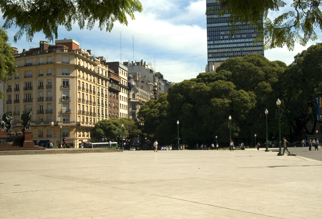 Plaza San Martin and Santa Fe Avenue, Buenos Aires.